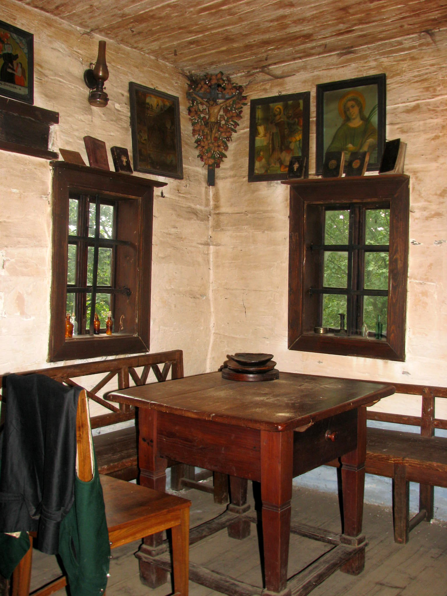 KAvčnikova domačija, Sevodnje, near Velenje, Slovenija